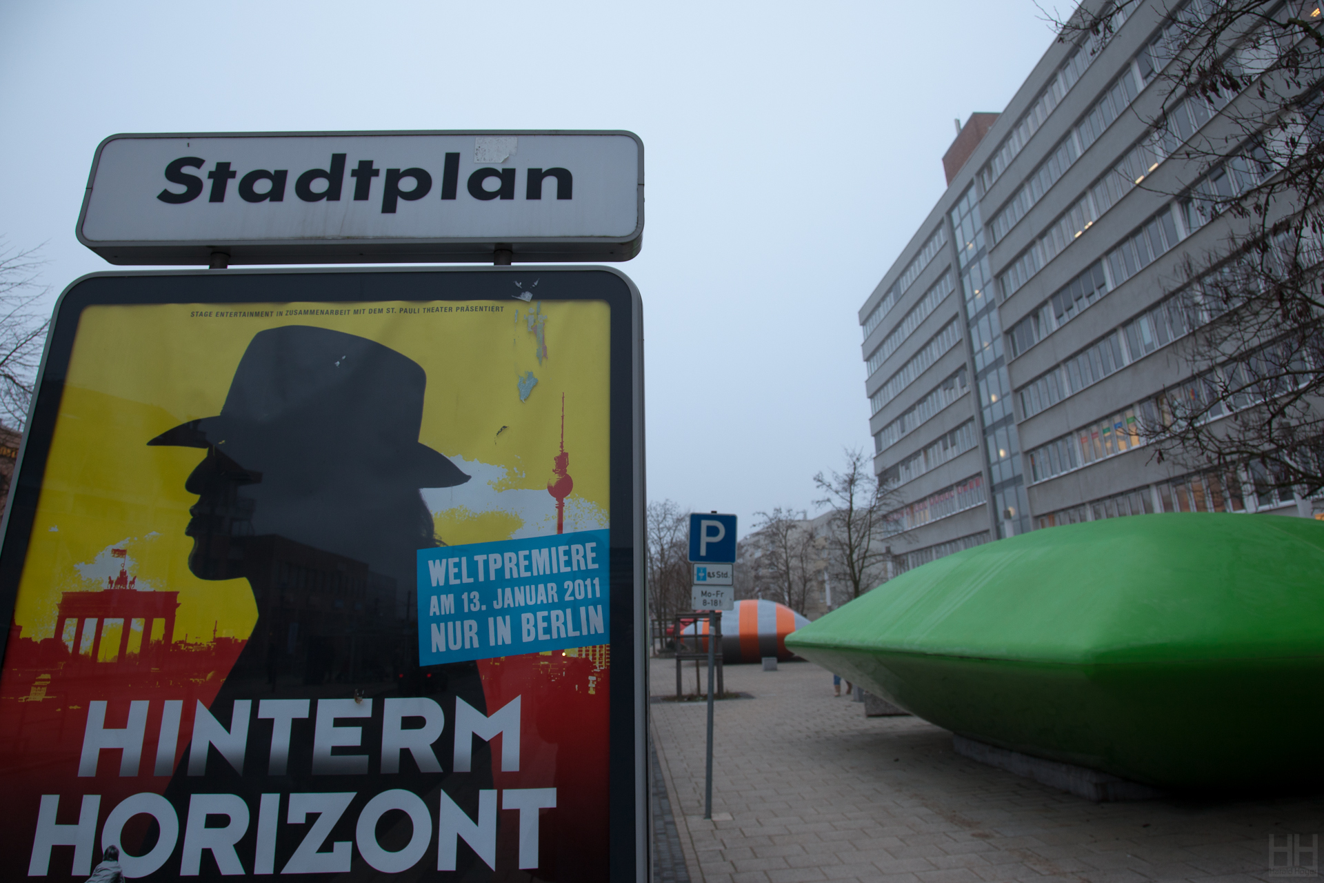 Hinterm horizont